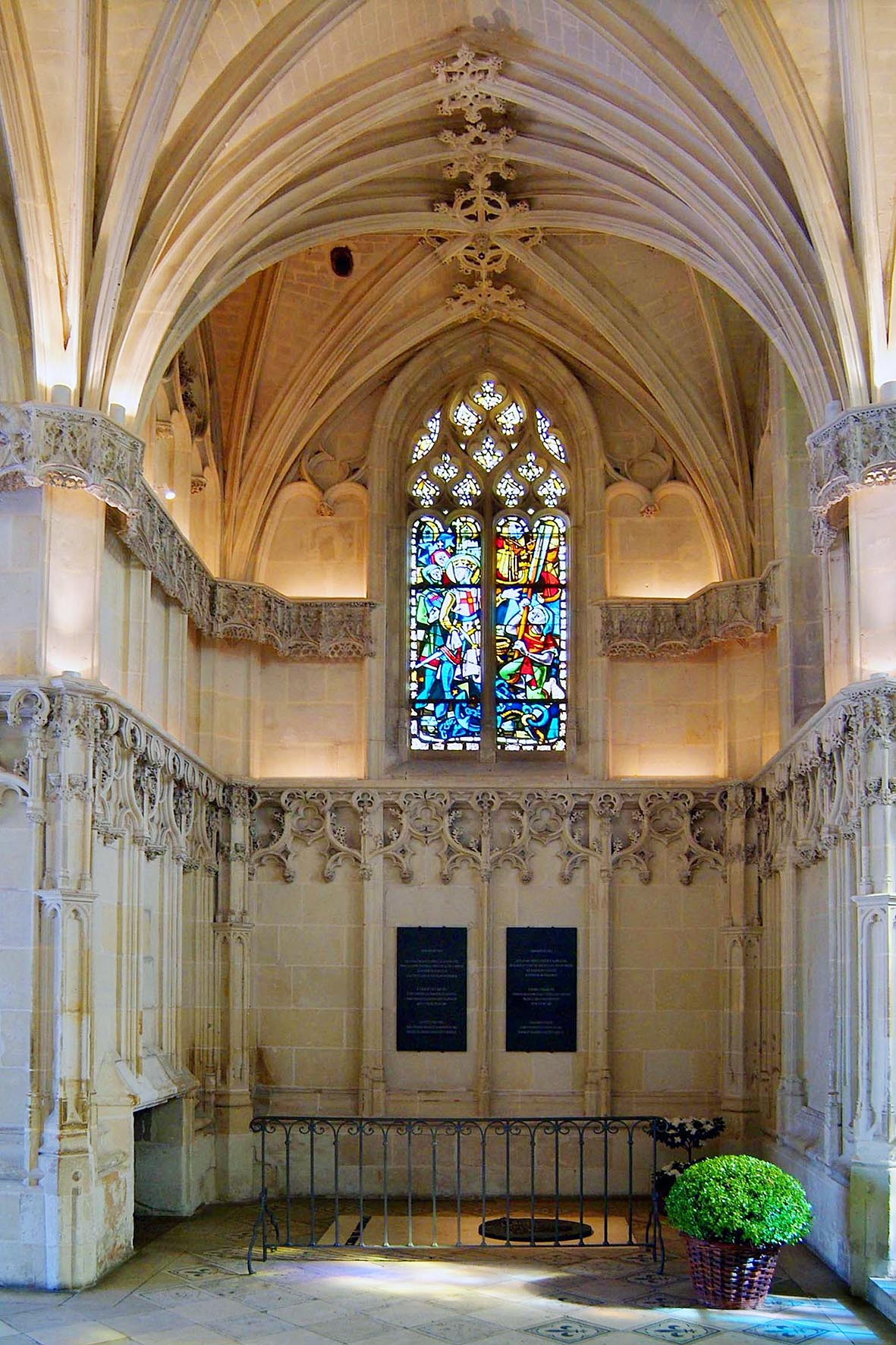 Schloss Amboise, Hubertuskapelle, südlicher Querarm mit dem Grab Leonardo da Vincis